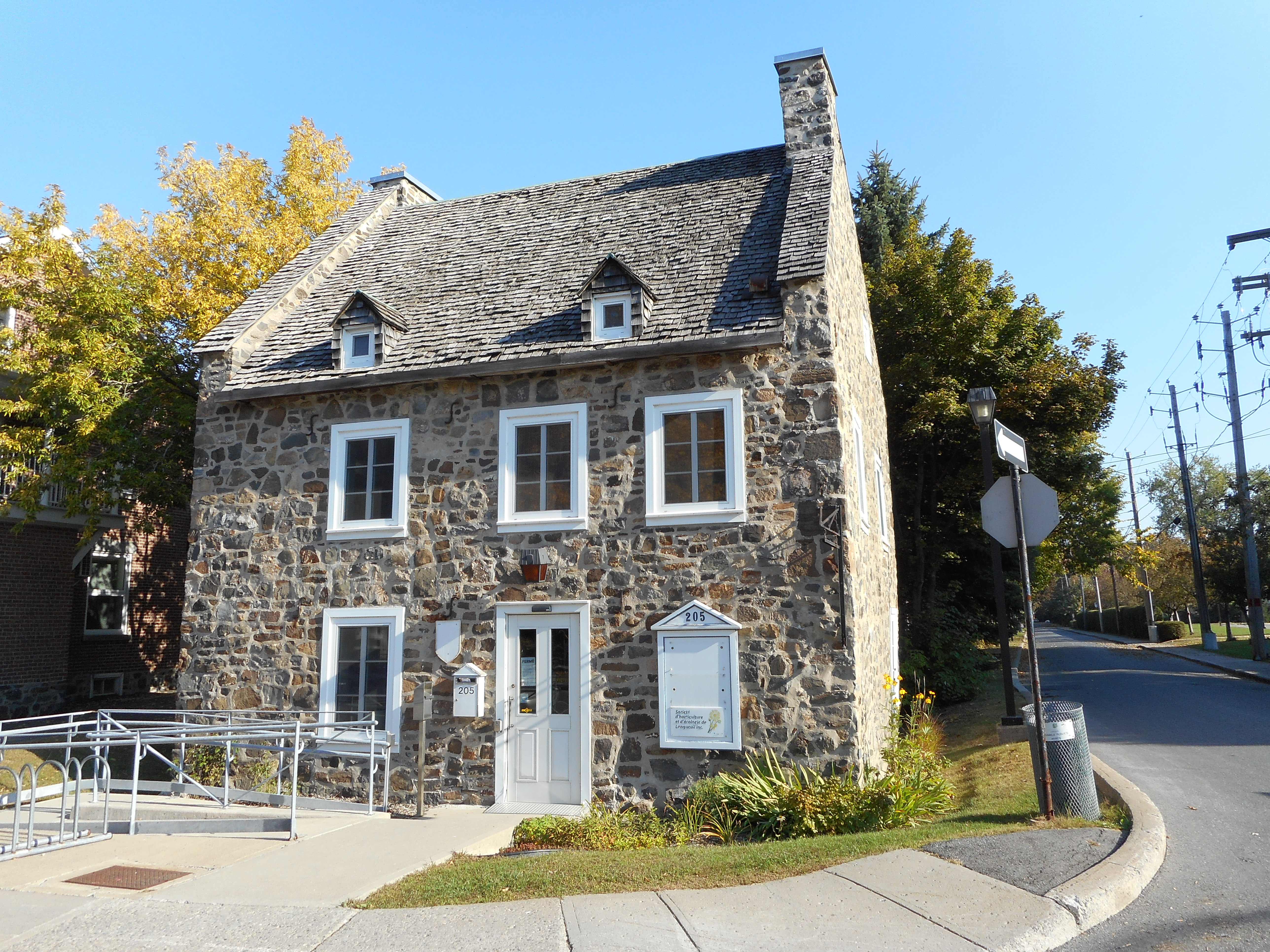 Maison Rollin-Brais, 205, chemin de Chambly, Vieux-Longueuil marigot.ca